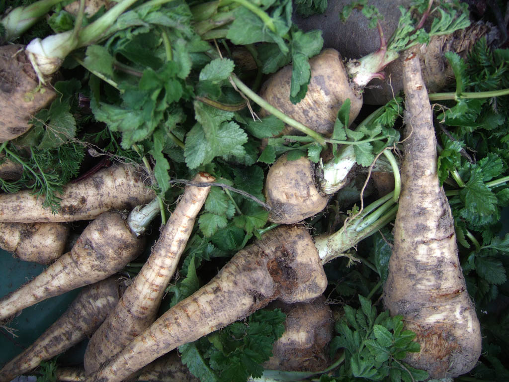 Wurzelpetersilie